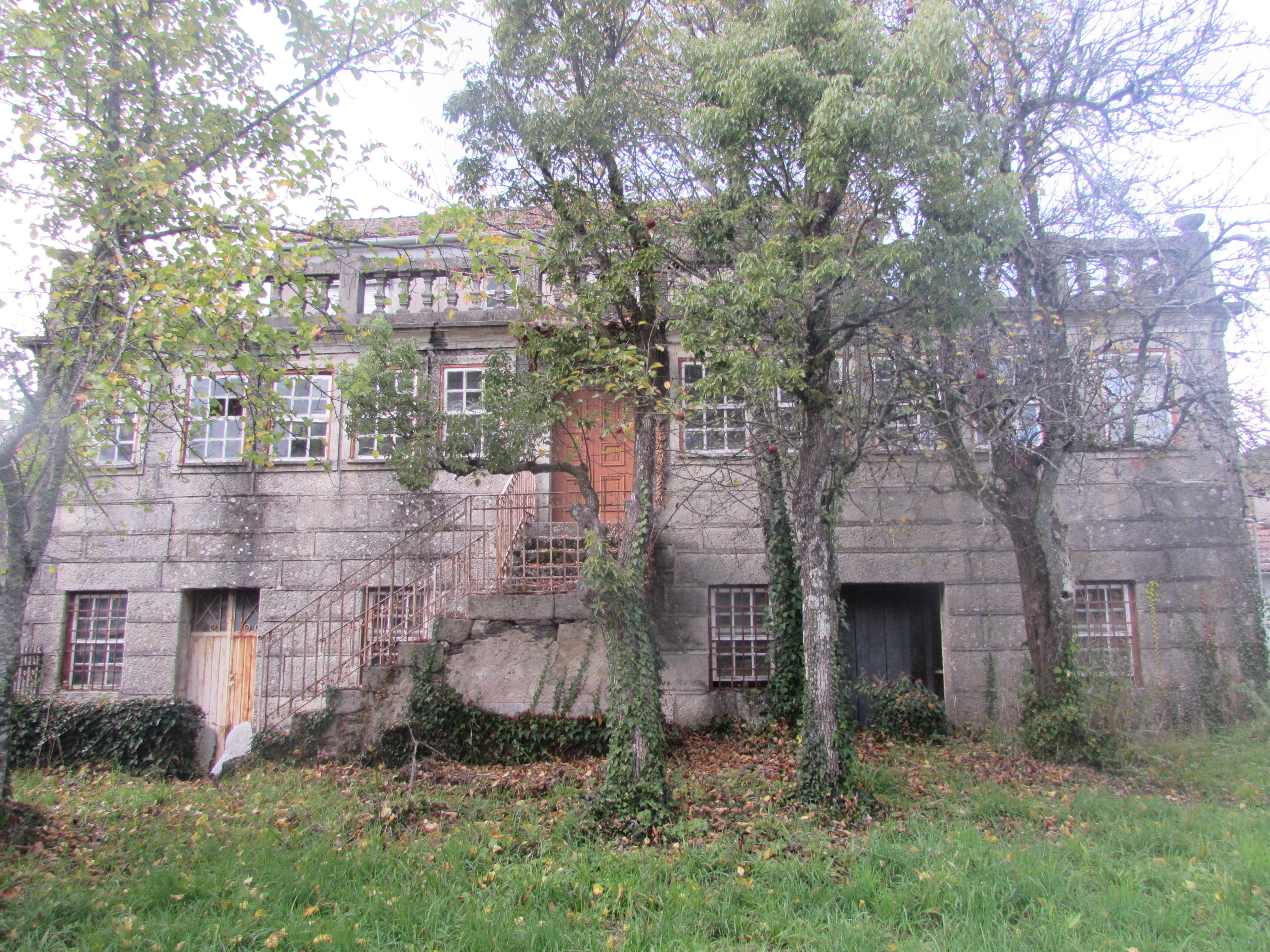 Casa habitada pela família Minhava